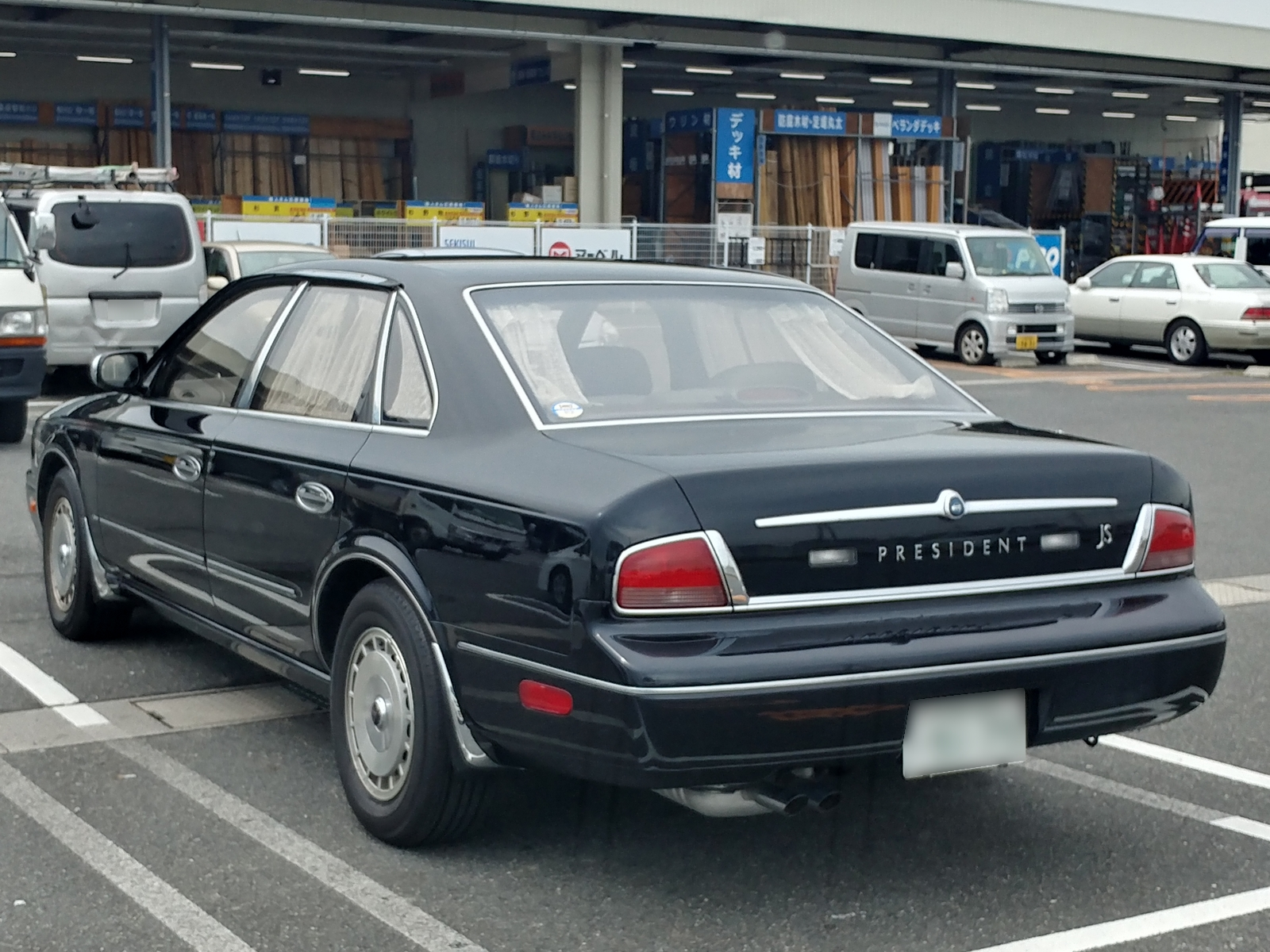 プレジデントJS タイプL（中期型）